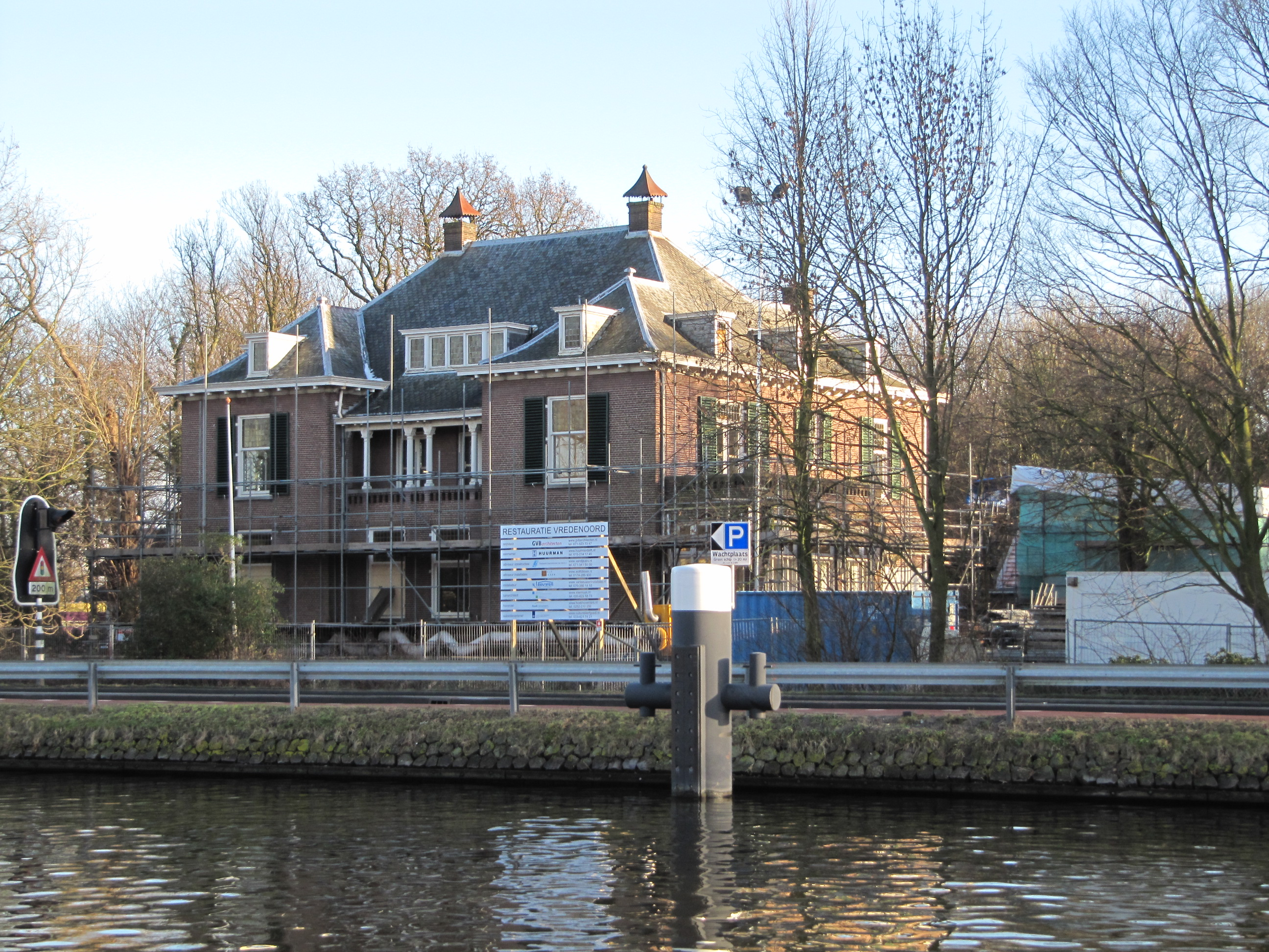 RM525046 Vredenoord.jpg